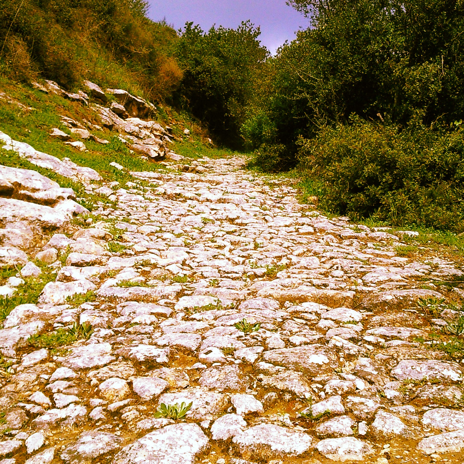 Strada Sos Baiolos (200 a.C.)